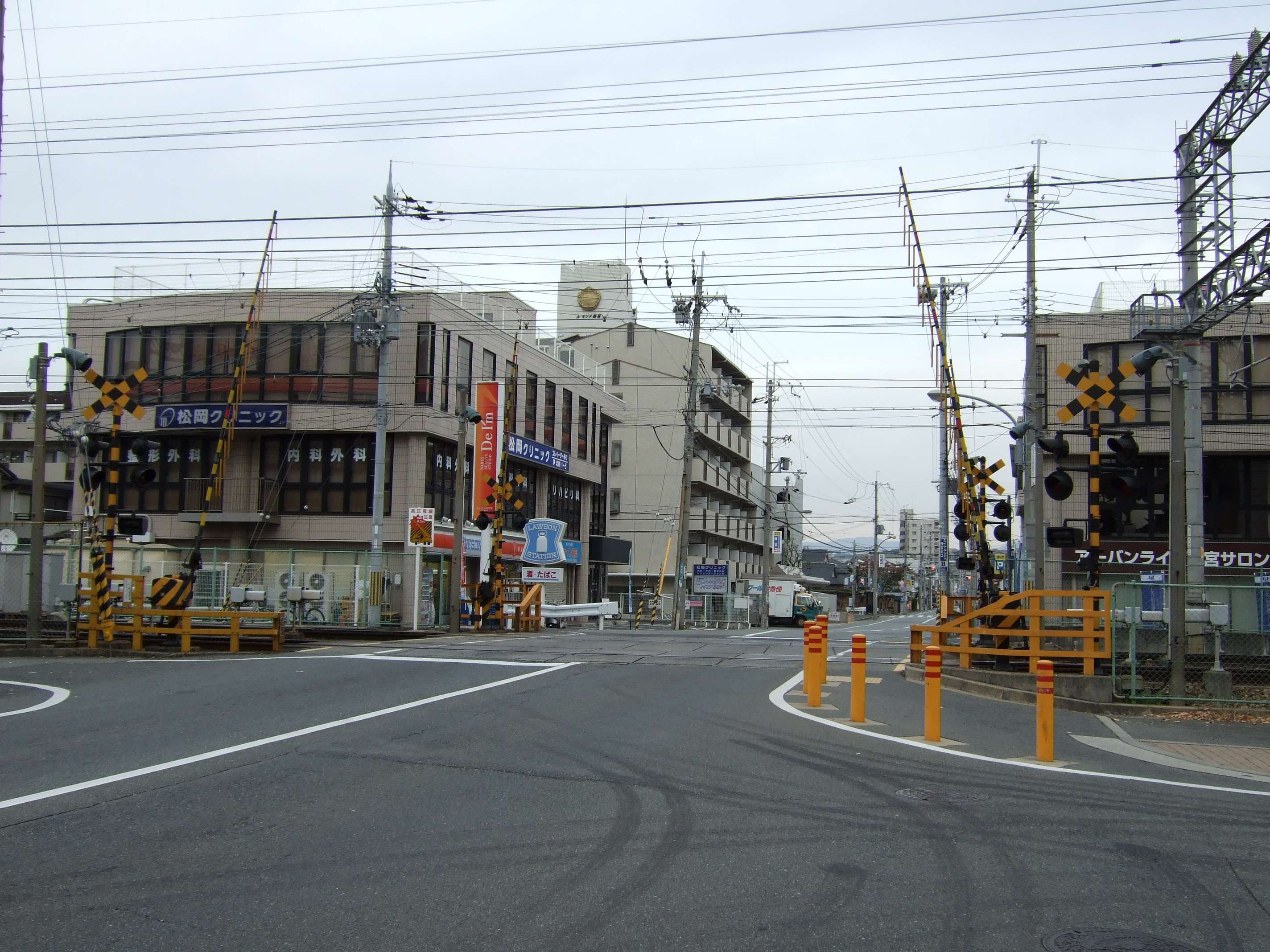 踏切南側から。